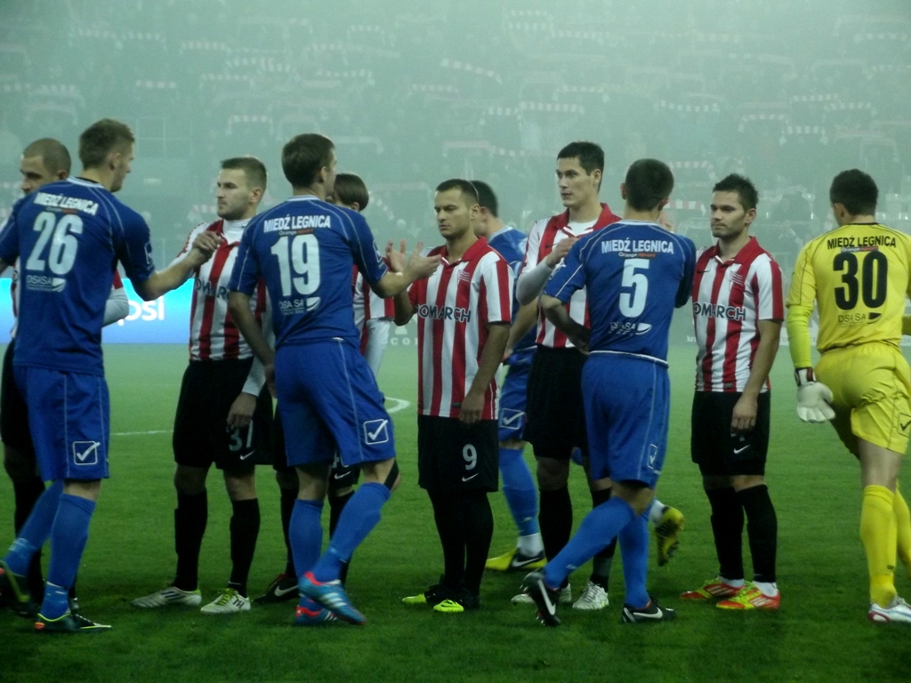 Zdjęcie zrobione podczas meczu polskiej I Ligi piłkarskiej, pomiędzy Cracovią a Miedzią Legnica